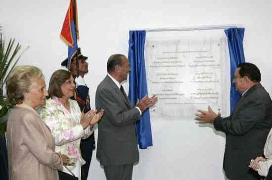 Inauguration de l´UFE